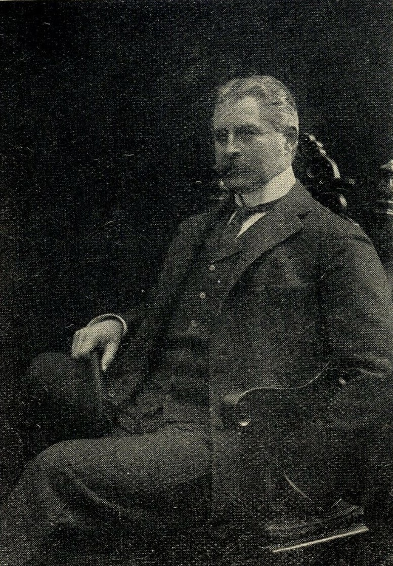 Dr. Graf Viktor Henckel von Donnersmarck, der neue deutsche Gesandte in Kopenhagen, 1906